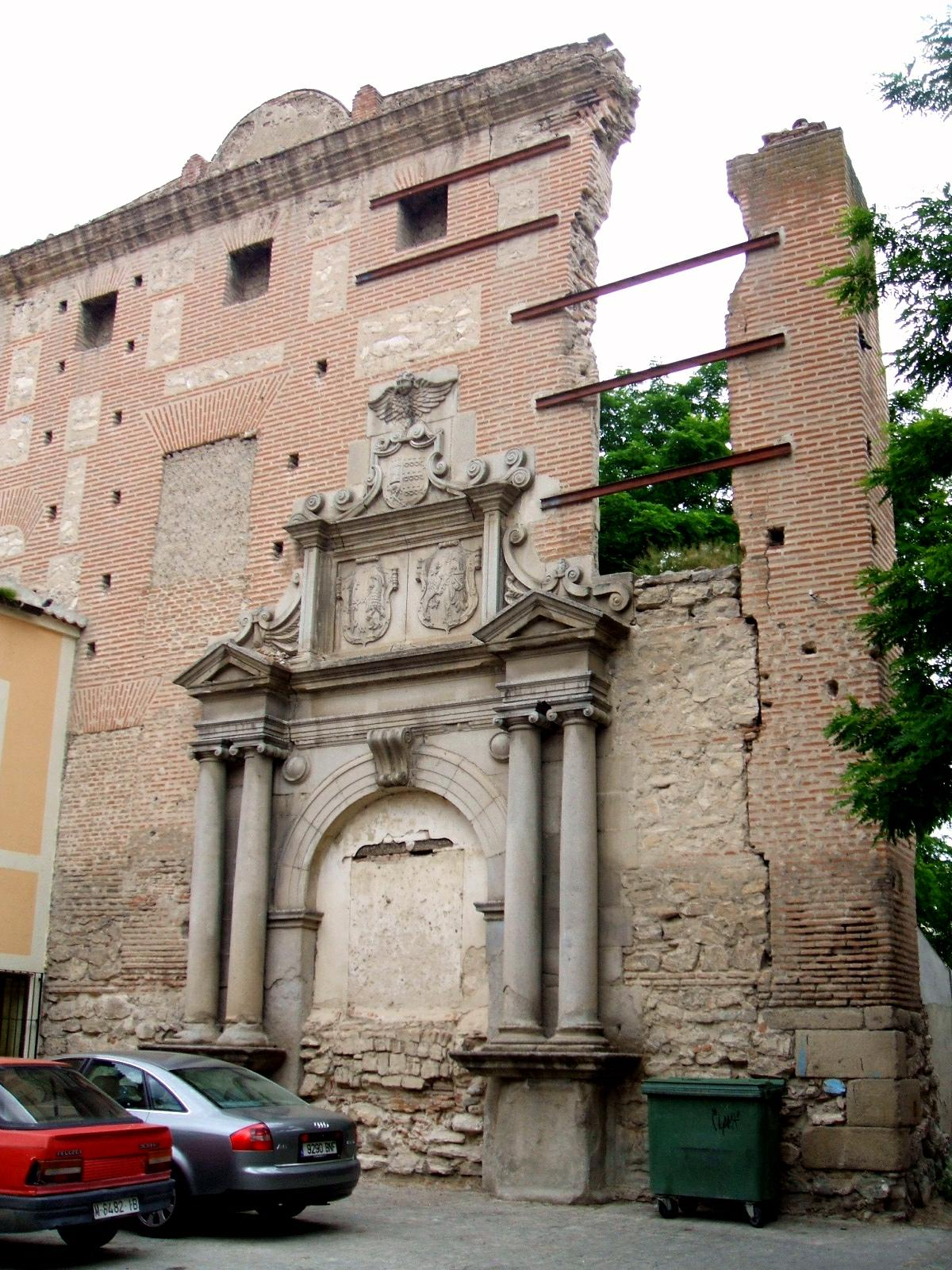 Casa-Palacio de Ballesteros Ronquillo (s-XVI), en Arévalo (Ávila, Castilla y León, España)